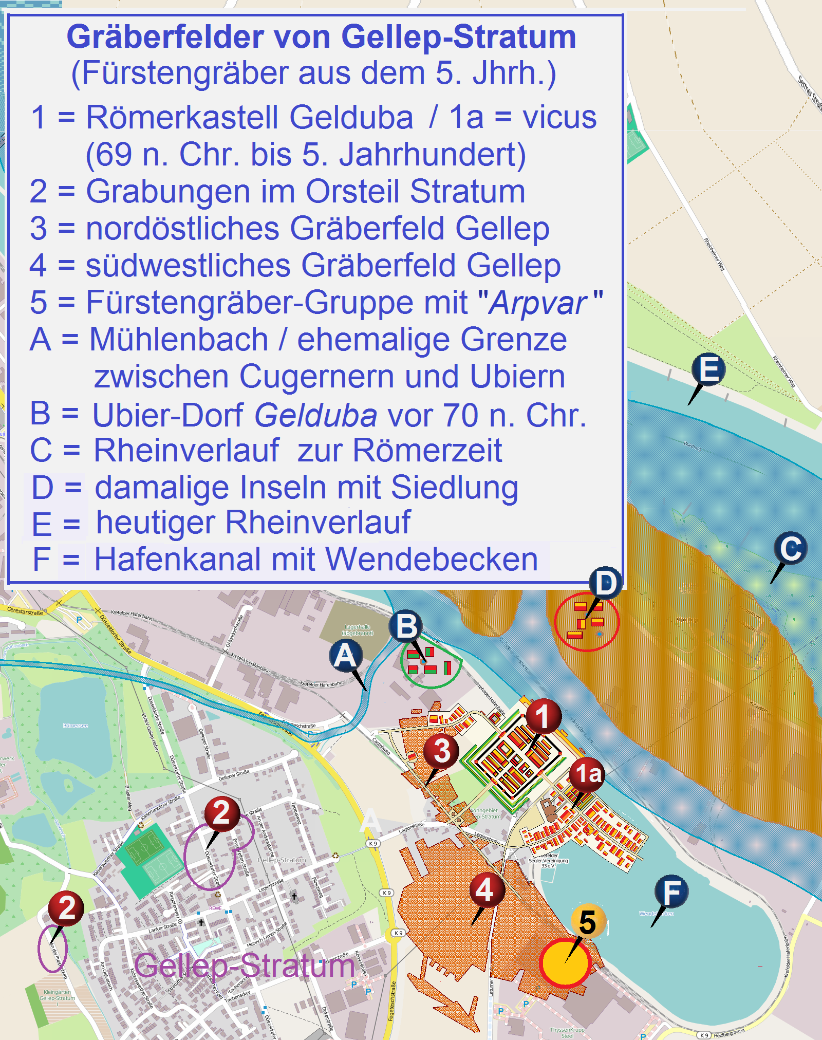 Graeberfelder Krefeld-Gellep Frankenzeit This map of Graeberfelder bei Gellep-Stratum, Fürstengraeberfeld mit Arpvar was created from OpenStreetMap project data, collected by the community. This map may be incomplete, and may contain errors. Don't rely solely on it for navigation.